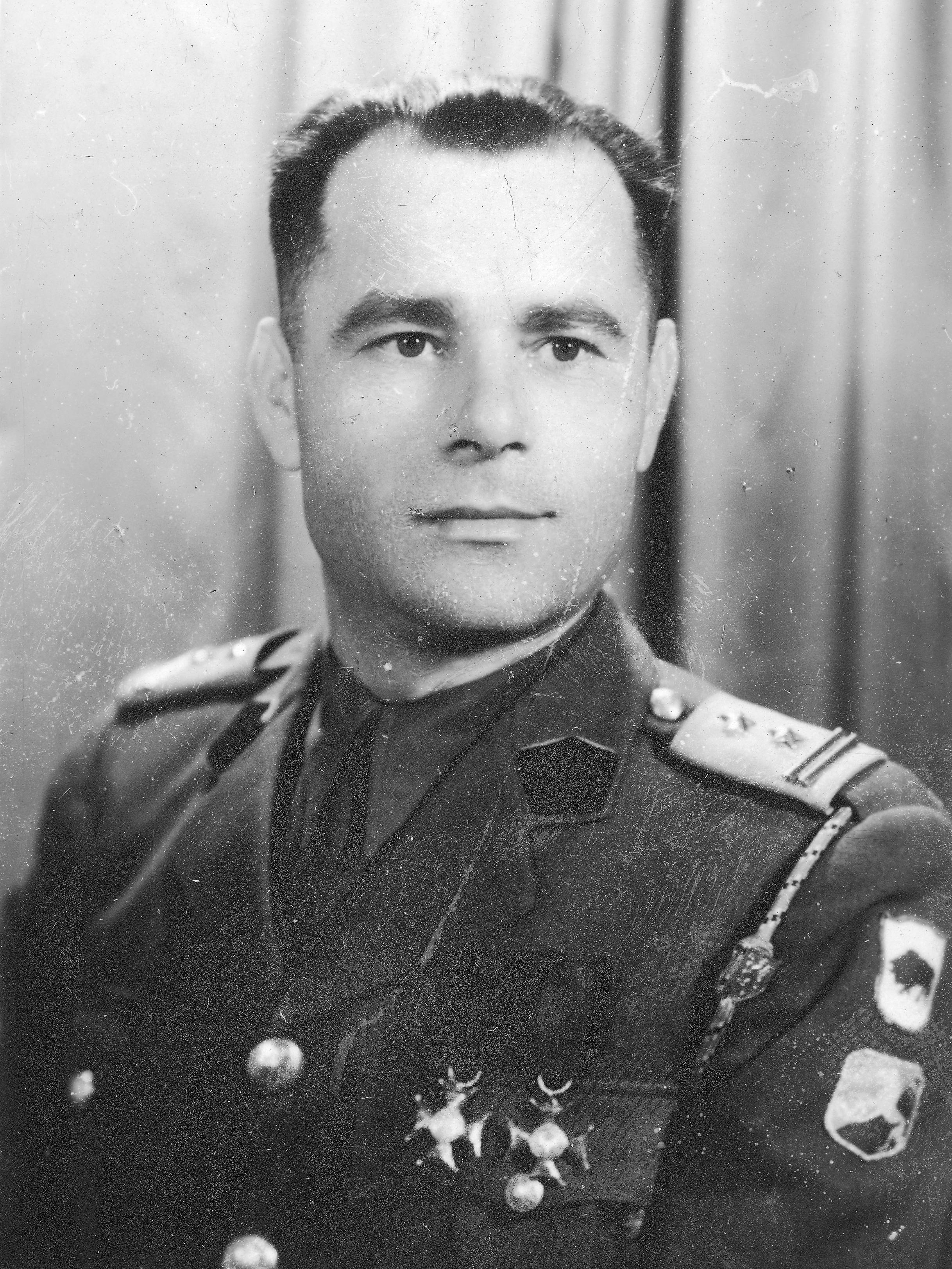 Andrzej Stańczyk, ppłk, d-ca 16 batalionu 5 Kresowej Dywizji Piechoty. Na jego mundurze widać krzyże Virtuti Militari IV i V klasy oraz norweski sznur naramienny za udział w kampanii norweskiej. Archiwum Fotograficzne Tadeusza Szumańskiego. Sygnatura: 24-240